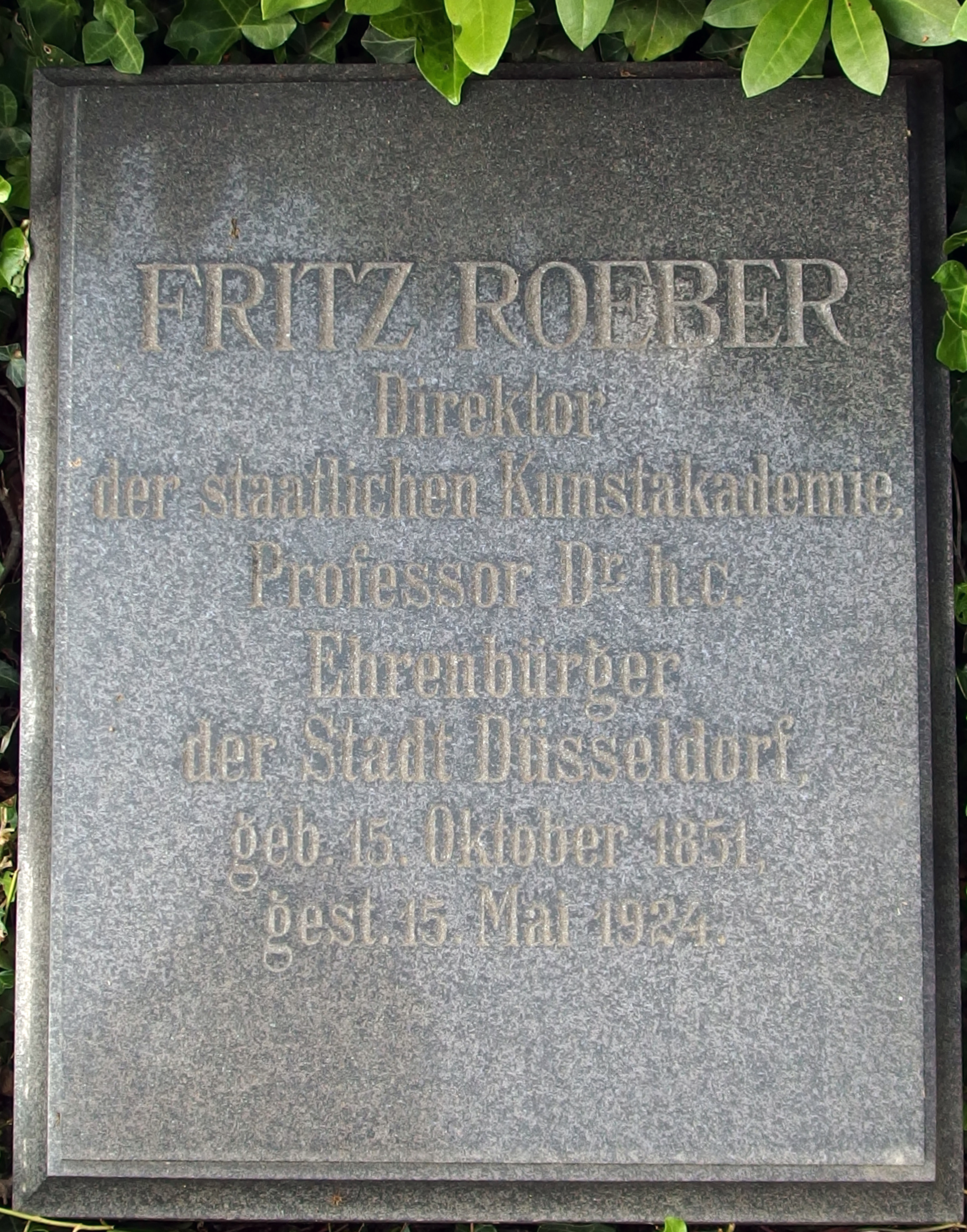 Grabstein Fritz Roeber, Nordfriedhof Düsseldorf